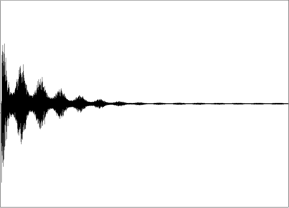 Bild selbst erstellt mit MestreC, gemessen und Stoff hergestellt an der Universität Ulm. Aufgetragen ist die induzierte Spannung als Funktion der Zeit